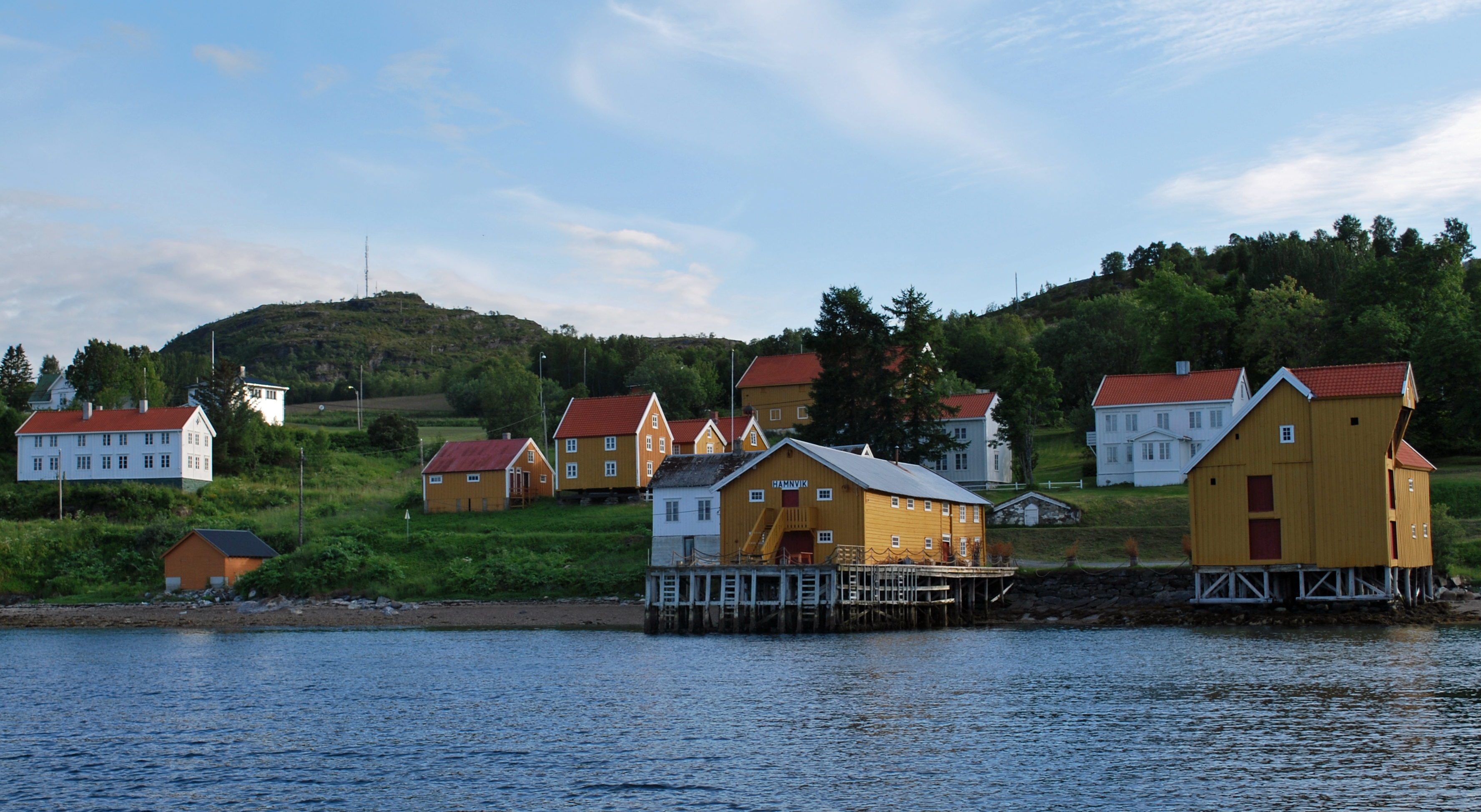 Handelsstedet Hamnvik, øya Rolla, Ibestad kommune, bygninger fra 1794, fredet